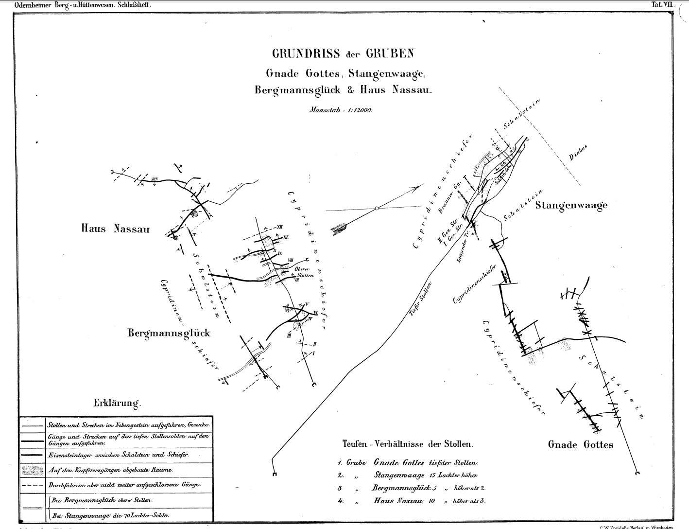 Grundriß der Gruben Gnade Gottes, Stangenwage (Stangenwaage), Bergmannsglück (Rutsch) und Haus Nassau im Maßstab 1:12000 mit Teufenverhältnissen der Stollen dieser Gruben